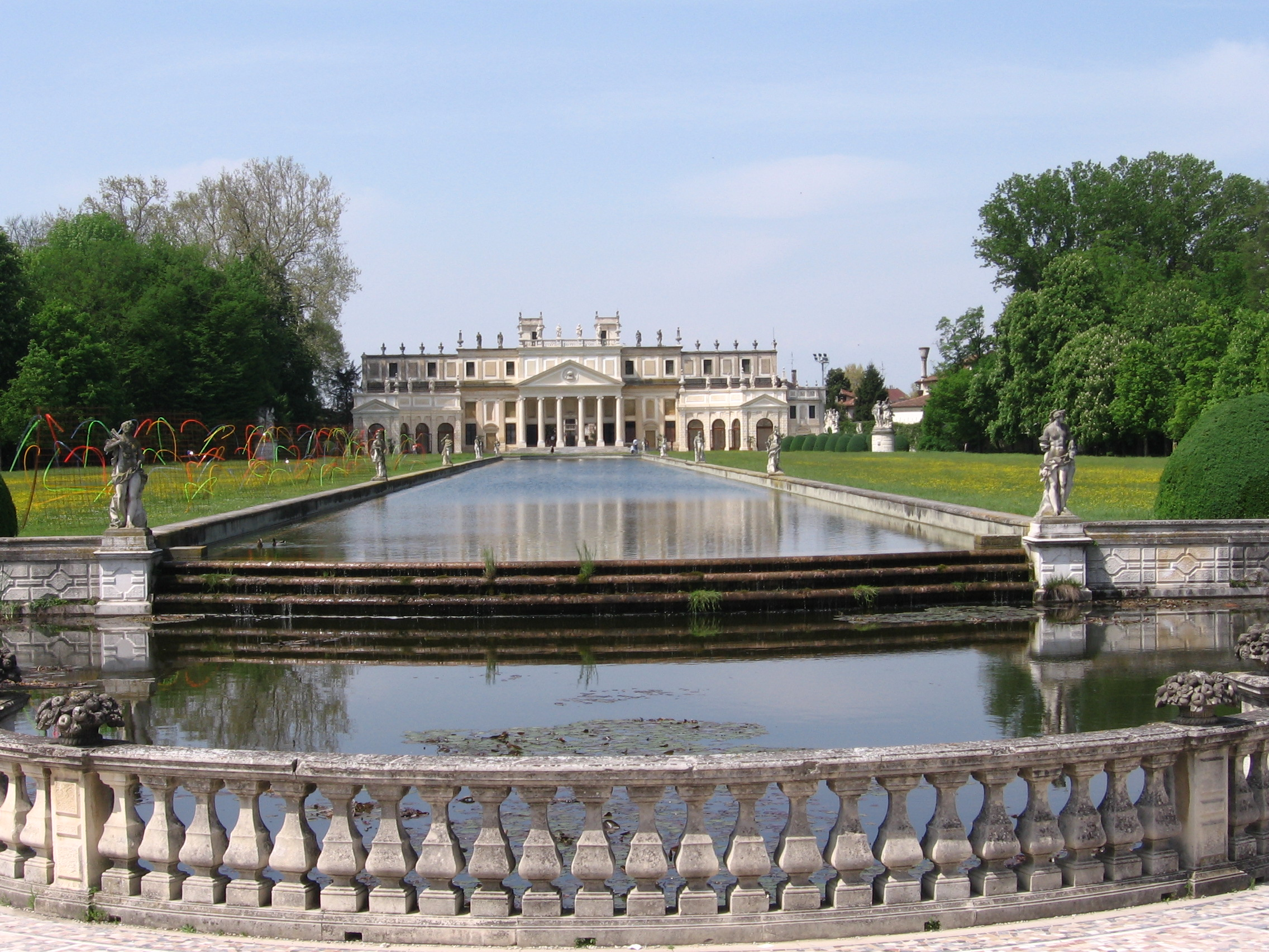 Villa Pisani a Stra.